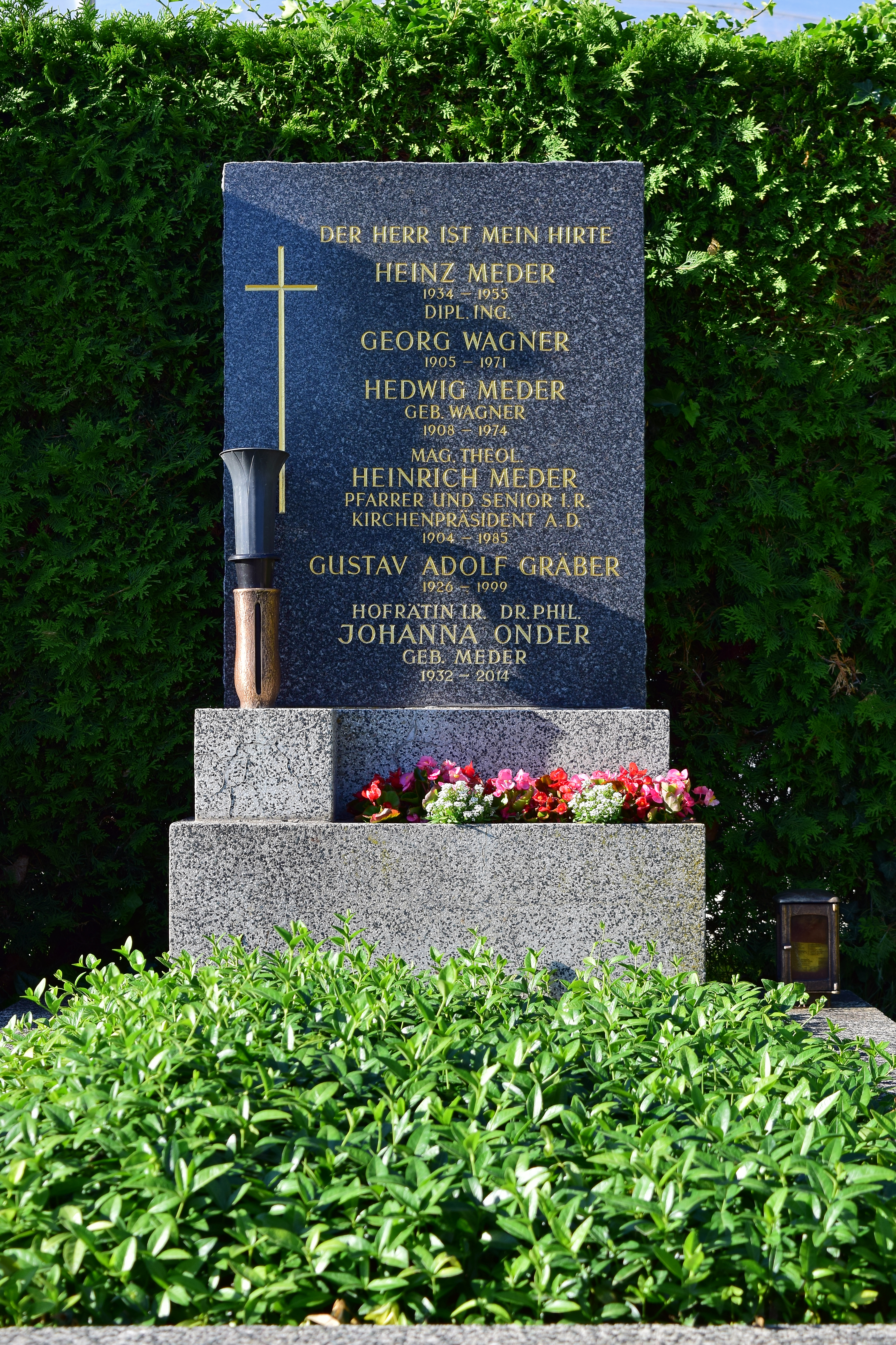 Ehrenhalber gewidmetes Grab von Heinrich Meder auf dem evangelischen Friedhof im Wiener Zentralfriedhof